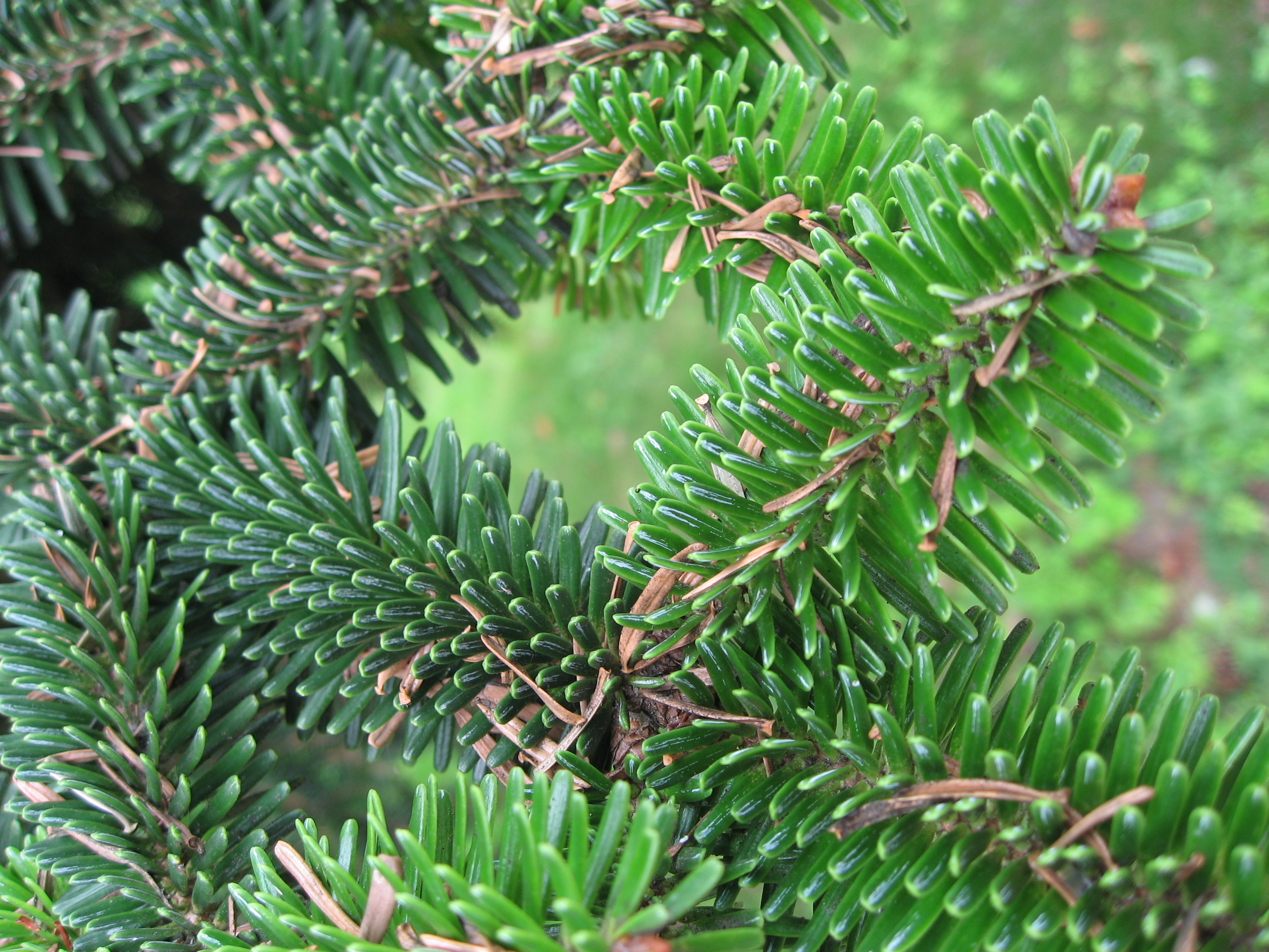 Abies numidica in Serres d'Auteuil Map: 48° 50' 49" N 2° 15' 8" E